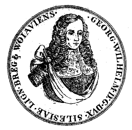 Georg Wilhelm I. von Liegnitz-Brieg-Wohlau. // Jerzy Wilhelm legnicko-brzeski